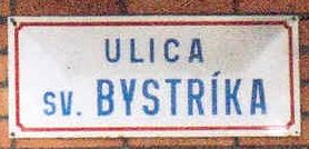 ulica Sv. Bystríka